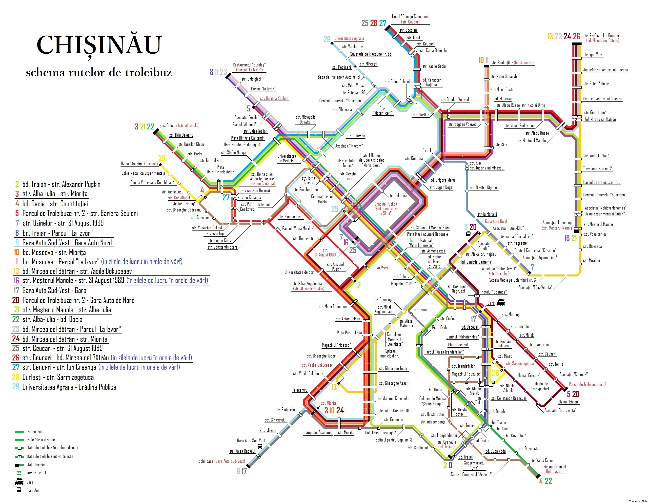 Схема троллейбусных маршрутов г. Кишинёва